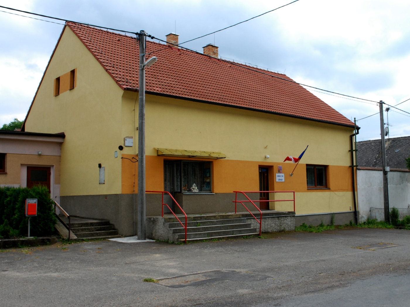 Malinová okr. Rakovník. Budova obecního úřadu